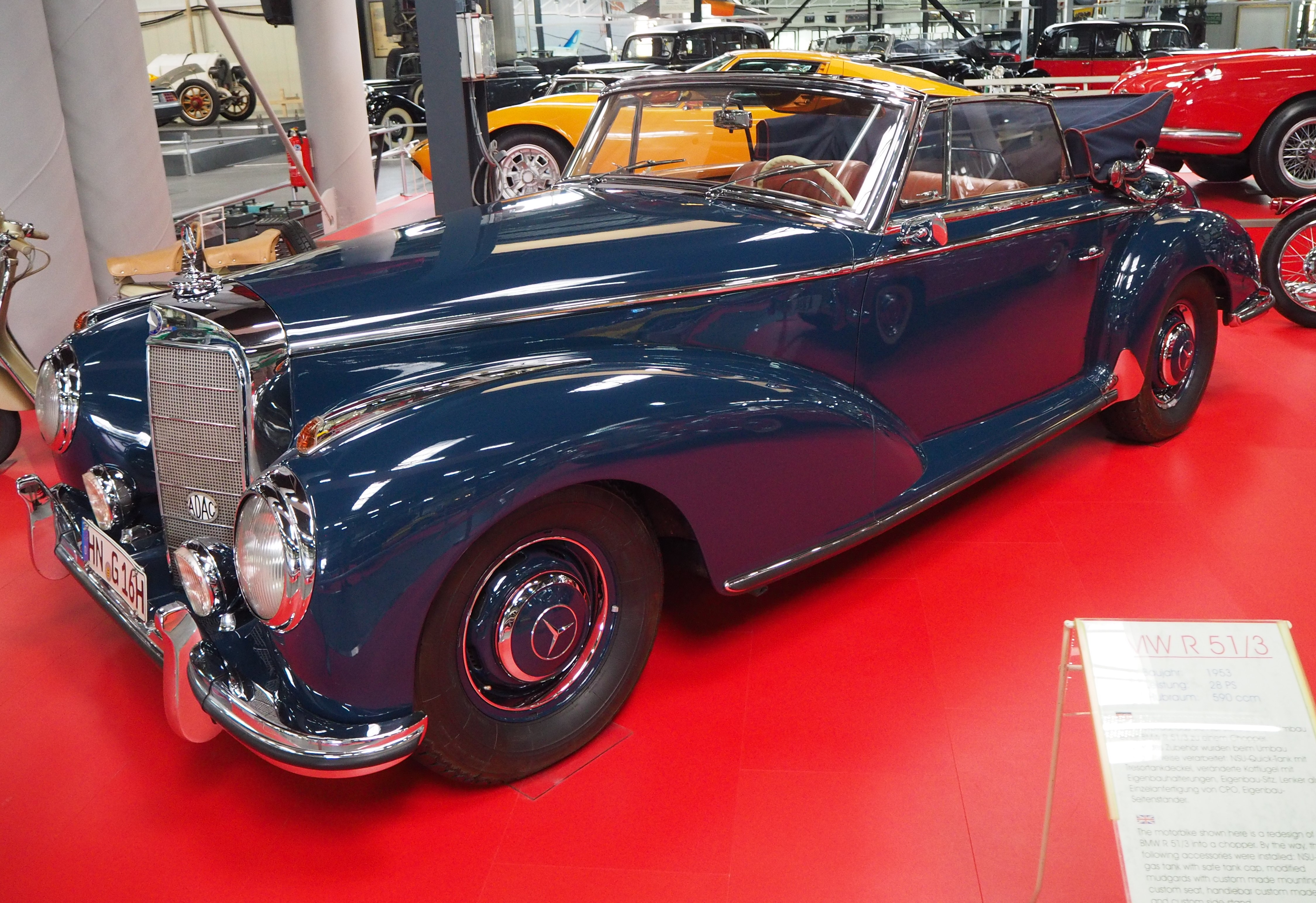 Mercedes-Benz 300 S Cabriolet